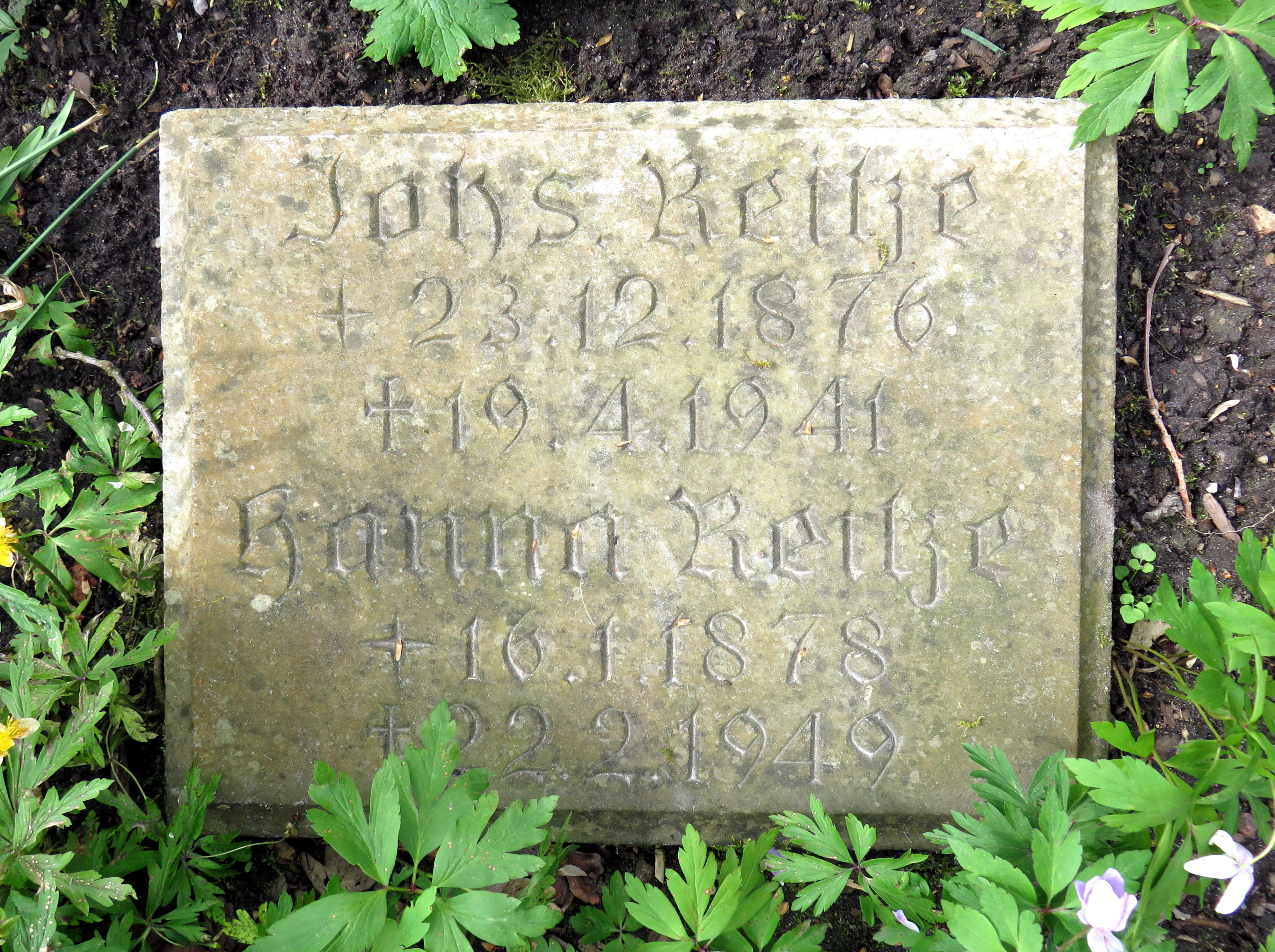 Historischer Grabstein der deutschen Politikerin Johanna Reitze im Bereich des Gartens der Frauen auf dem Ohlsdorfer Friedhof in Hamburg-Ohlsdorf.